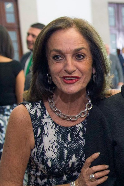 Maria del Carmen Izaguirre Francos, senadora de México de 2012 a 2018.